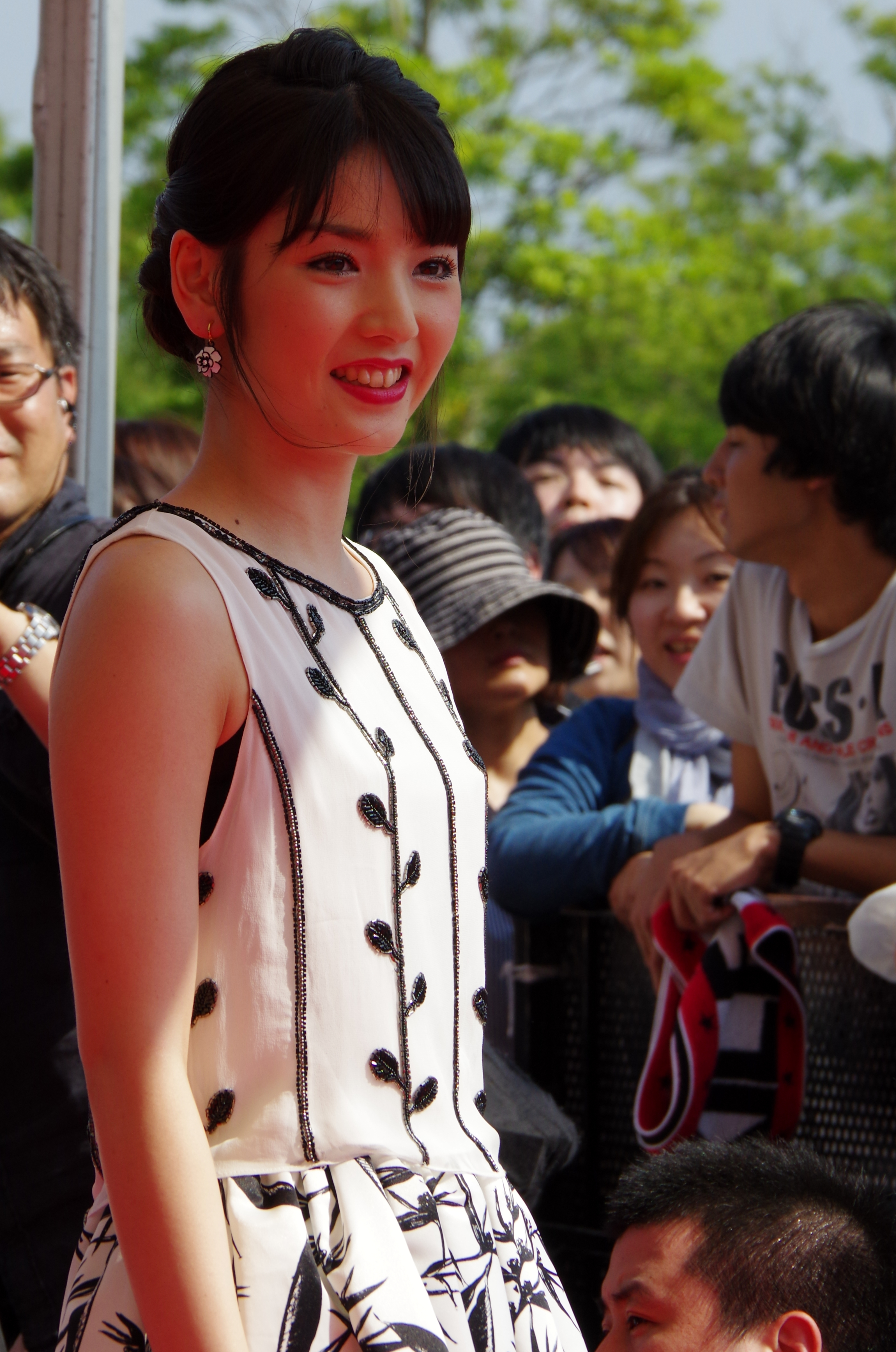 MTV VMAJ 2014_014_道重さゆみ